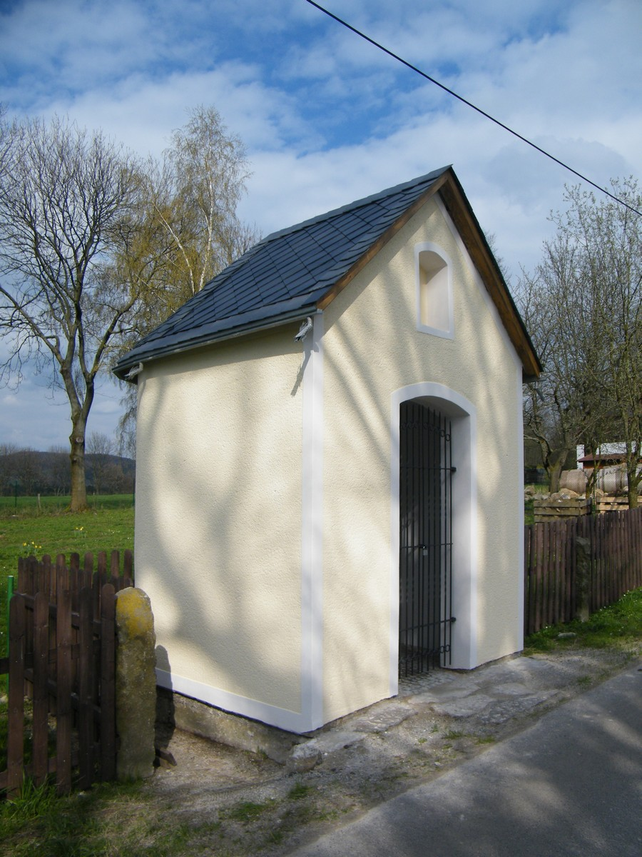 Kaple Matky Boží v Mikulášovicích po rekonstrukci omítek